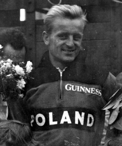 Zbigniew Głowaty, Wyścig Rás Tailteann, Irlandia rok 1963